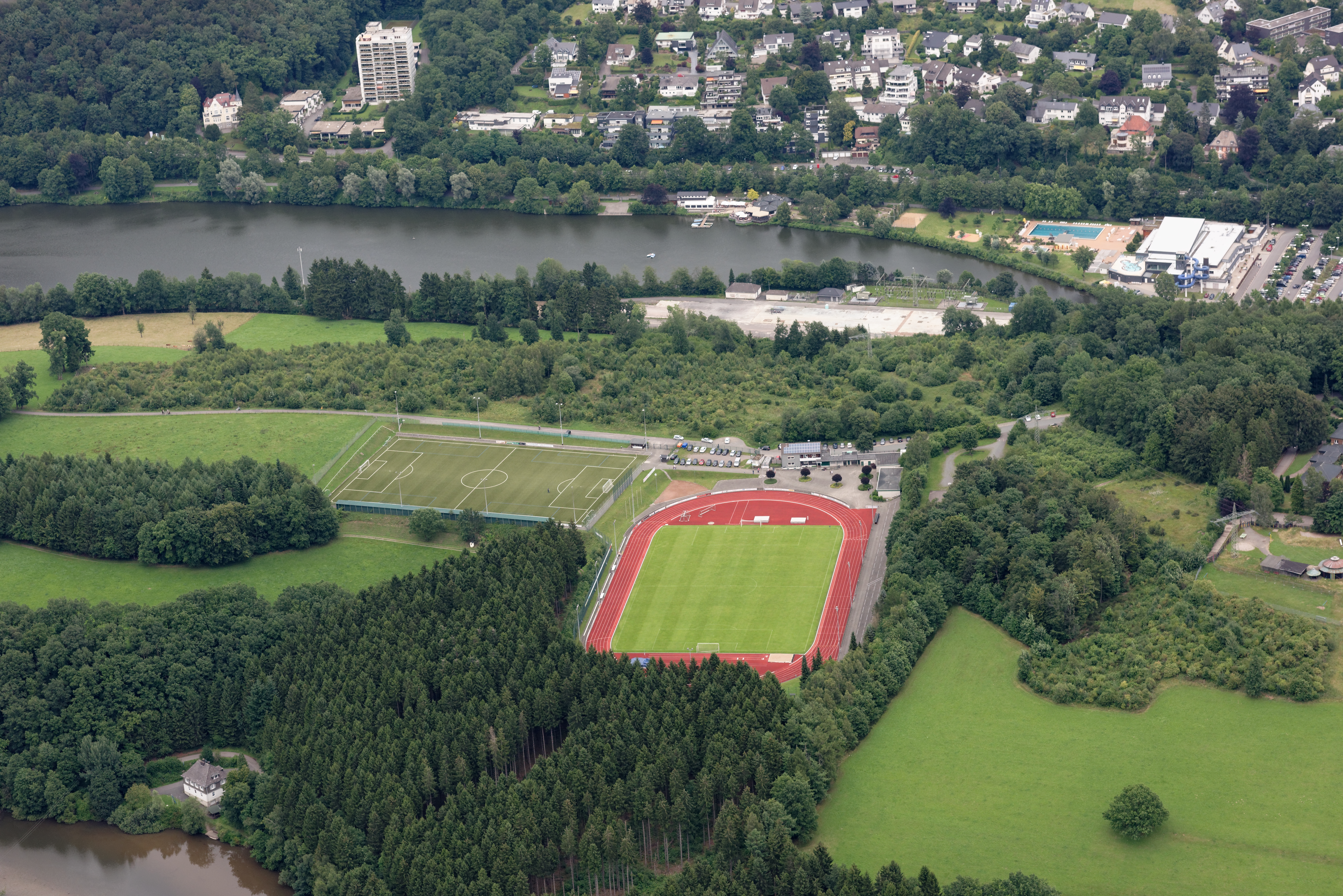 Luftaufnahme: Olpe mit Kreuzbergstadion, Ausläufer des Biggesees und Freizeitbad Olpe, Nordrhein-Westfalen